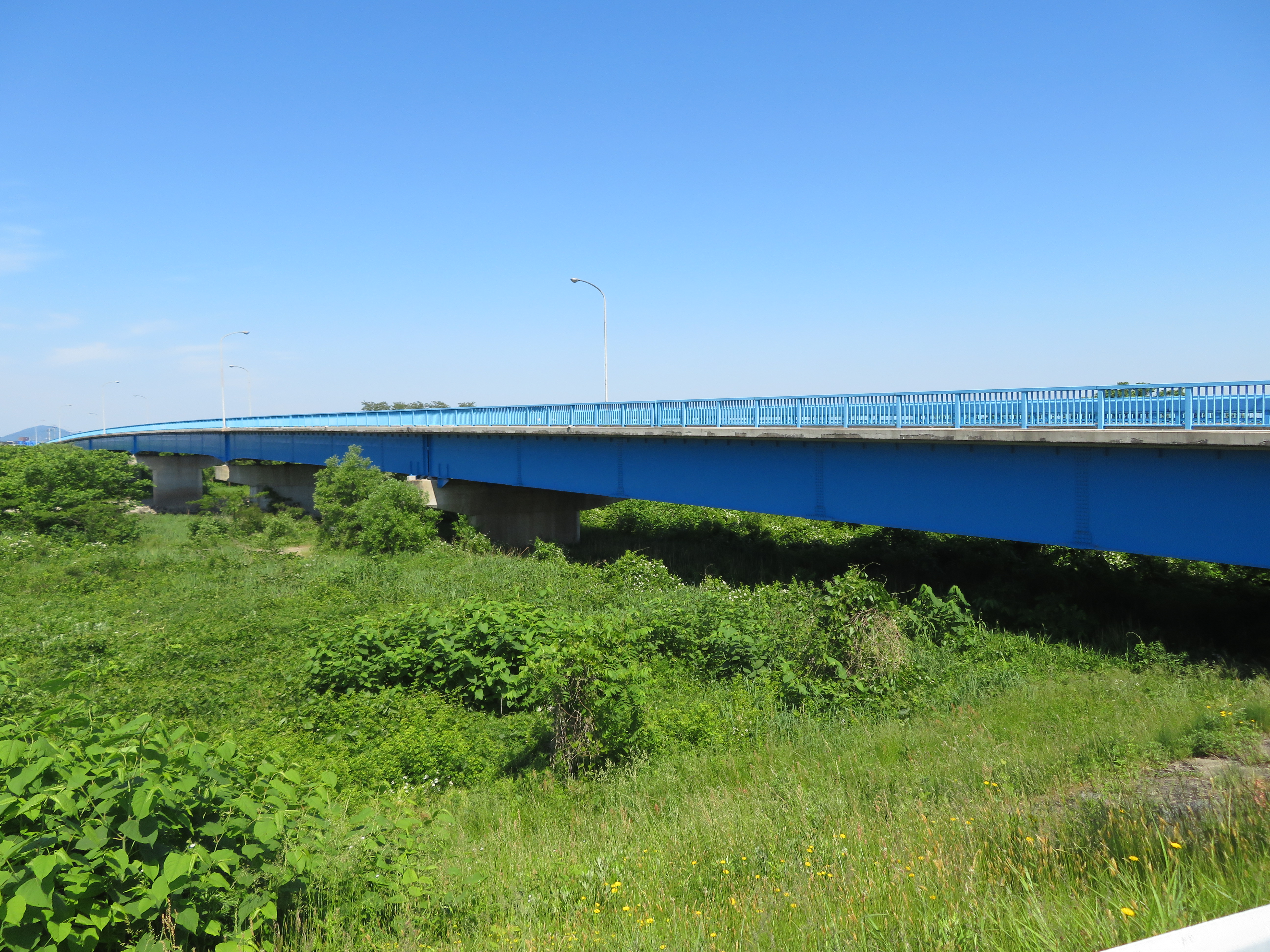 国道345号線山形県鶴岡市赤川に架かる三川橋（赤川右岸側土手から撮影）